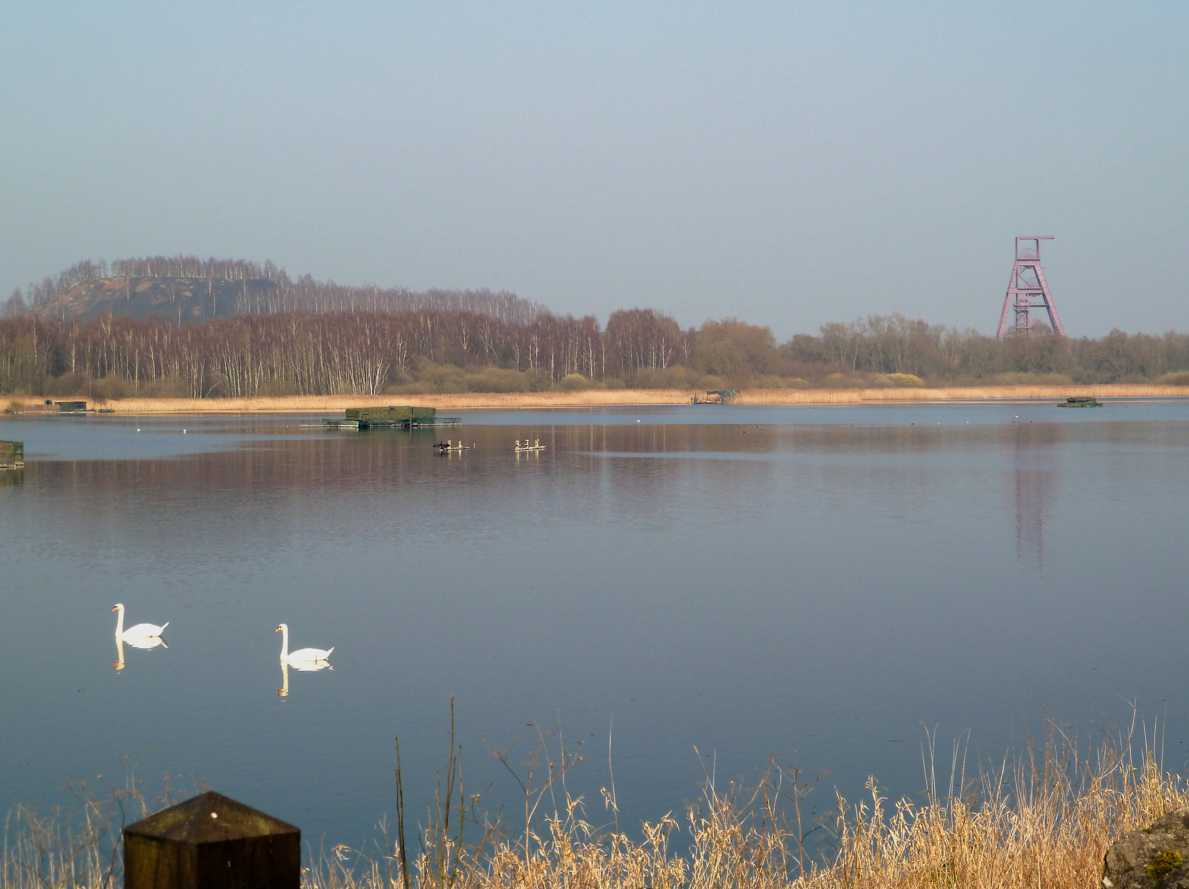 Le chevalement de la Fosse Ledoux et l’étang de Chabaud Latour Condé-sur-l’Escaut, Nord.- Nord-Pas-de-Calais .